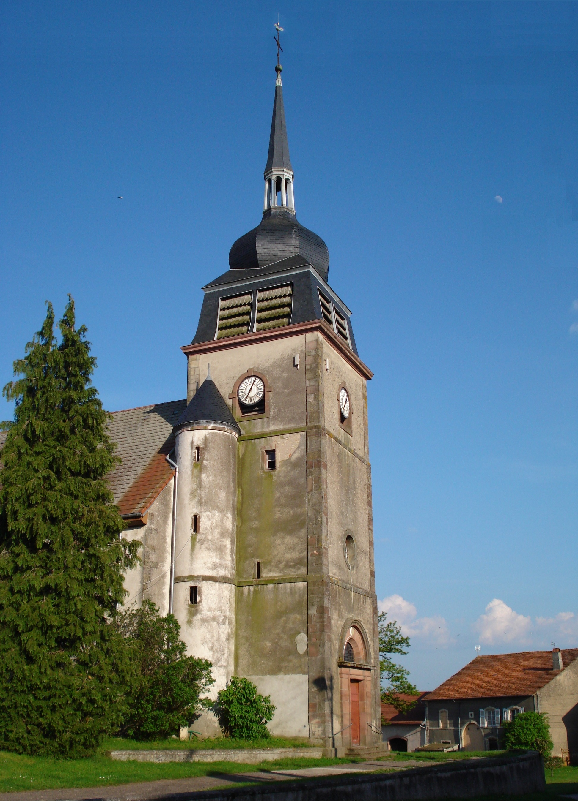 L'église actuelle de Domjevin construite en 1733